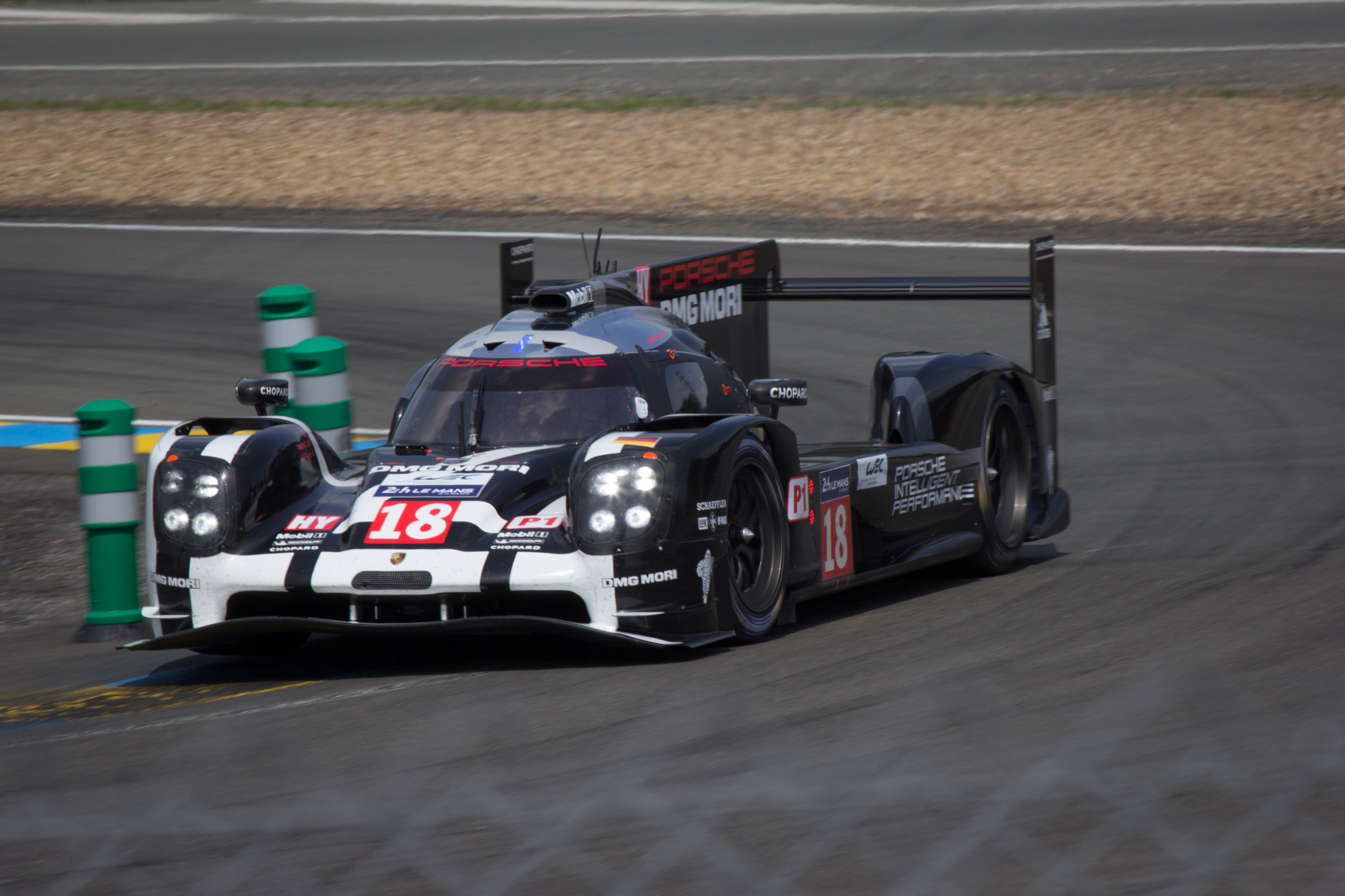 Porsche Team - Porsche 919 Hybrid #18